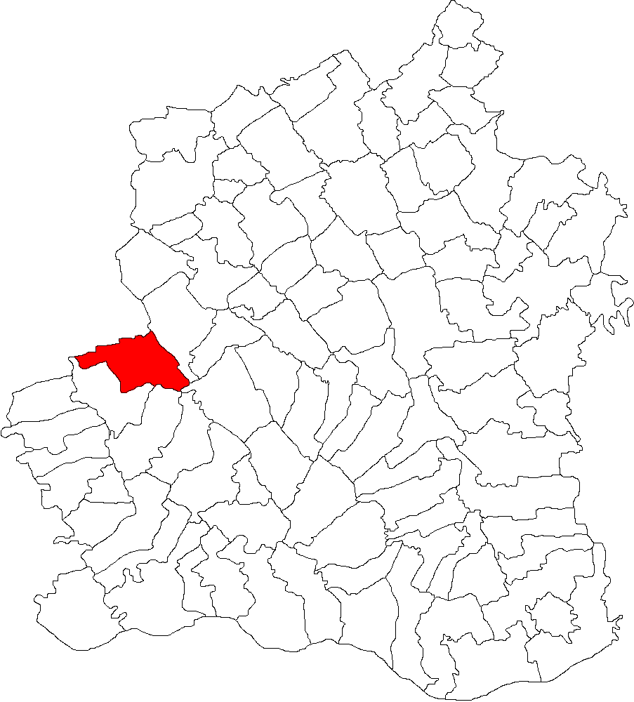 Categorie:Hărţi ale judeţului Teleorman